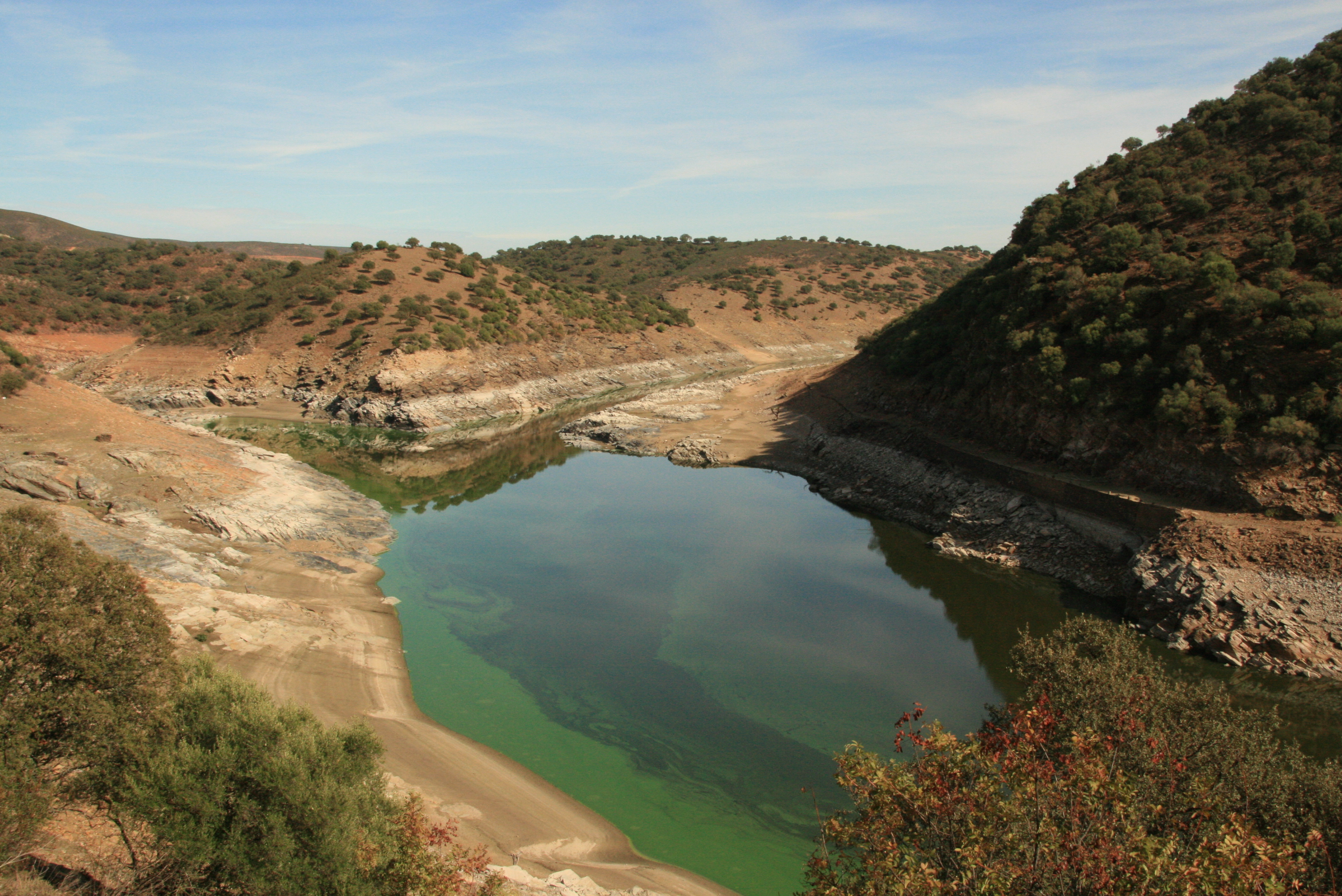 Desembocadura del Tietar en el Tajo, en el P. N. de Monfragüe